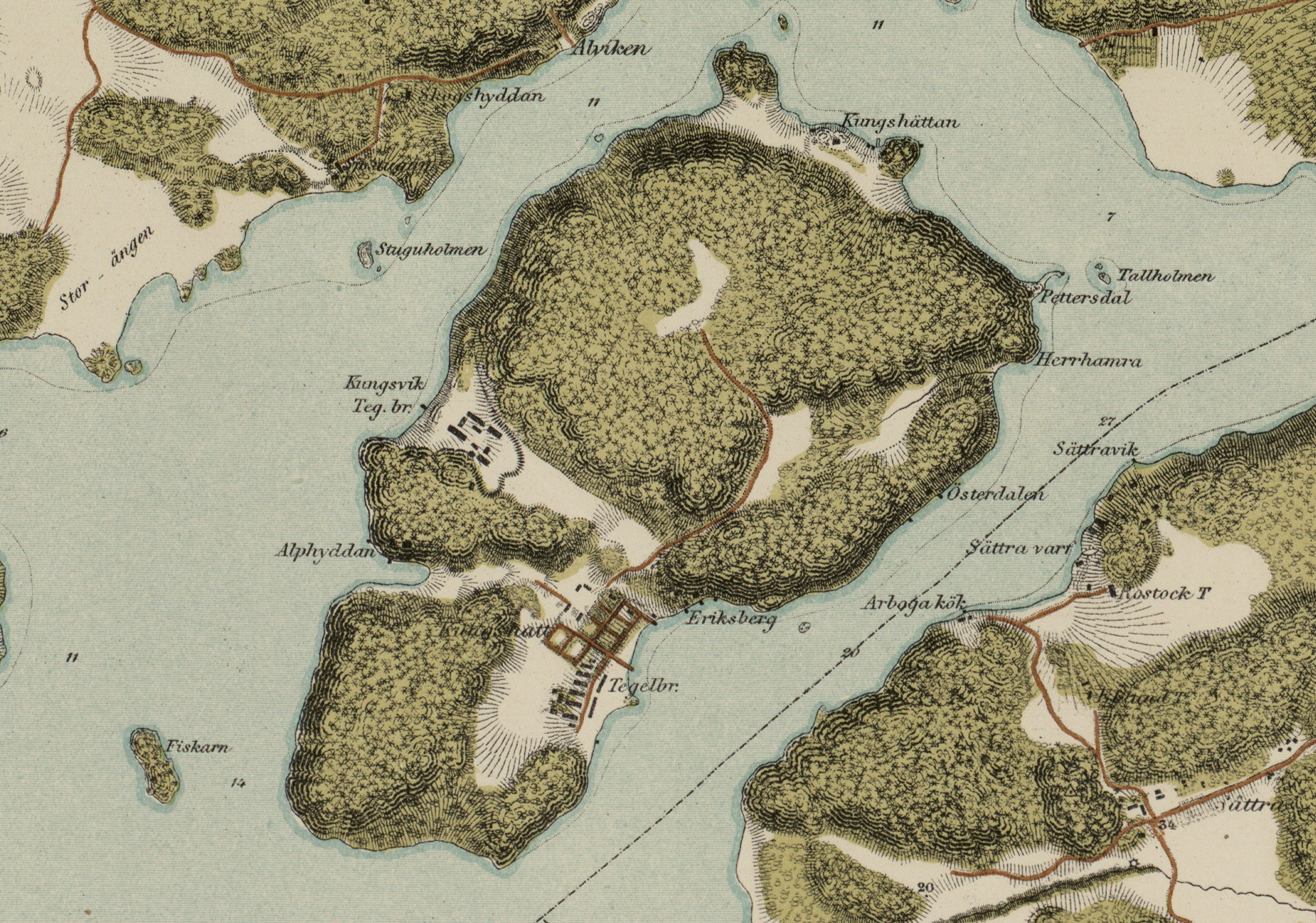 Kungshatt och Sätra kring 1860